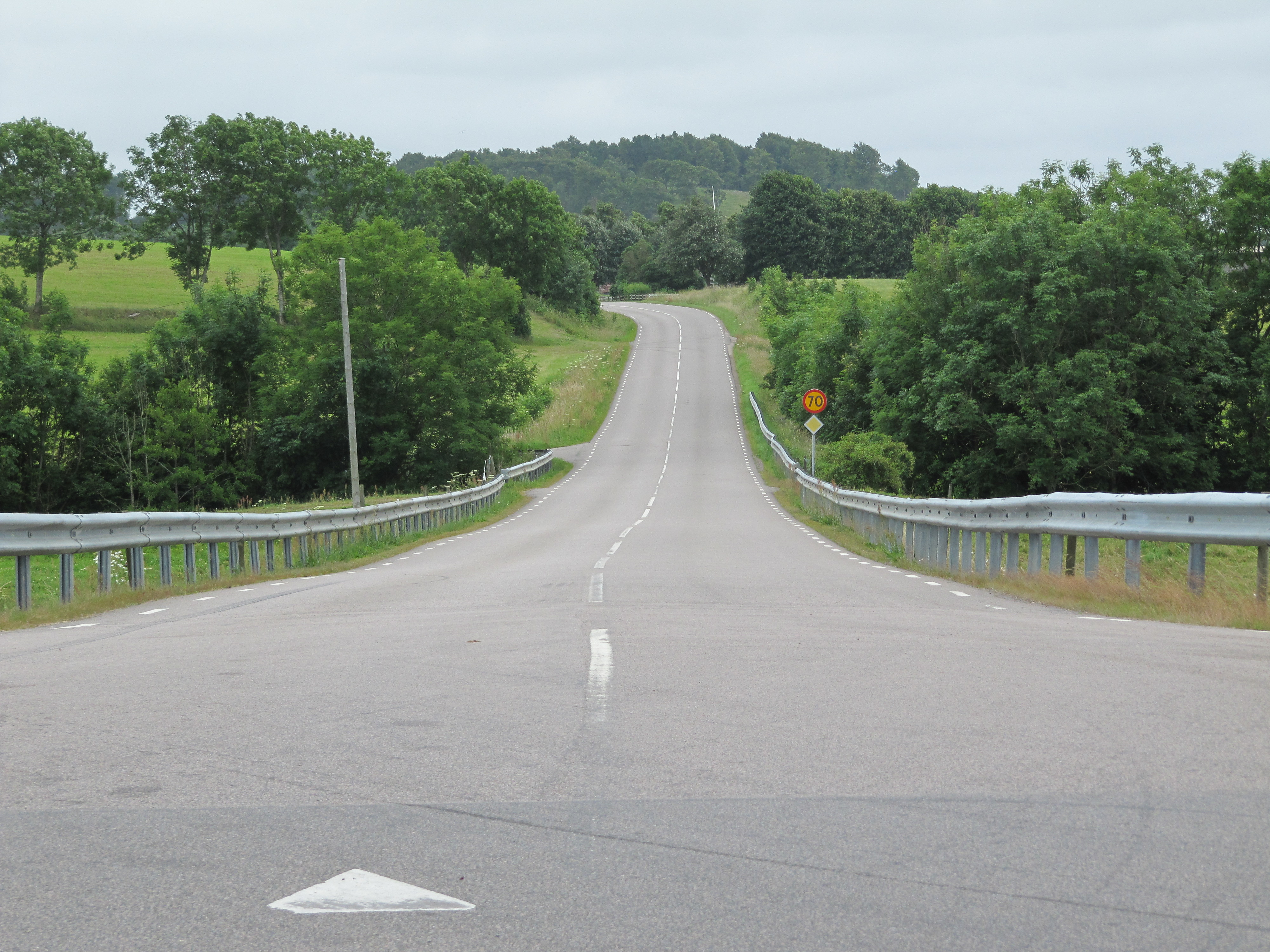 Länsväg 105 vid Hov